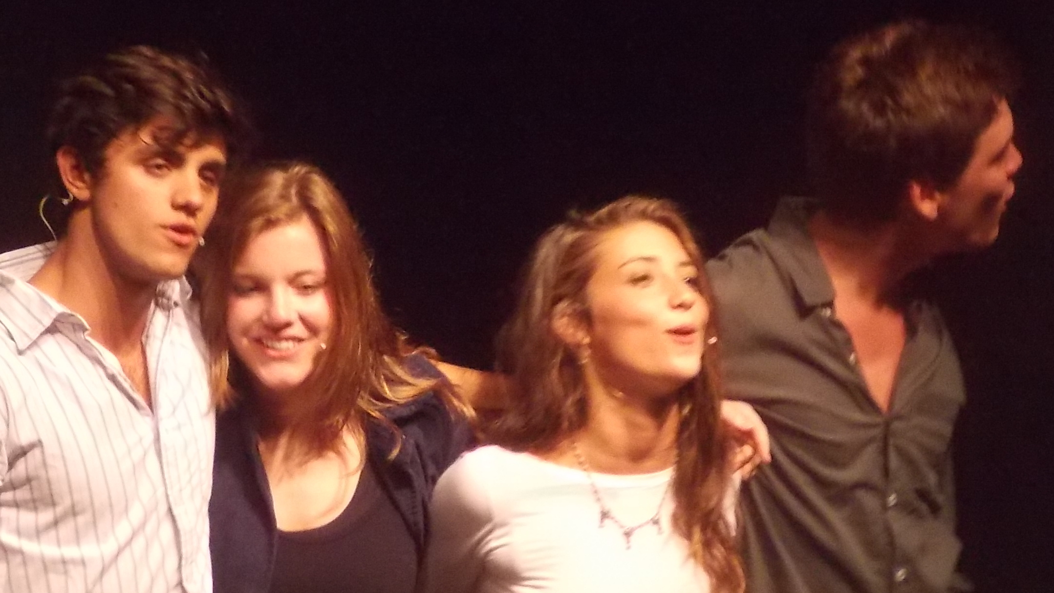 Elenco da peça "Conto de Verão".